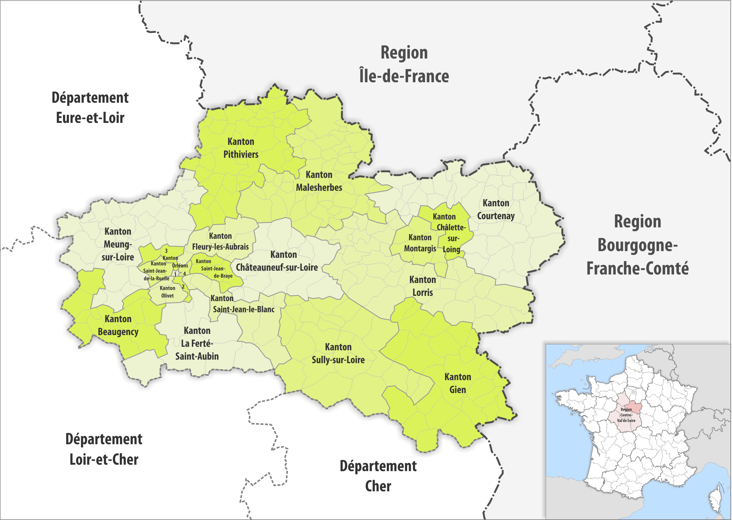 Gemeinden und Kantone im Departement Loiret